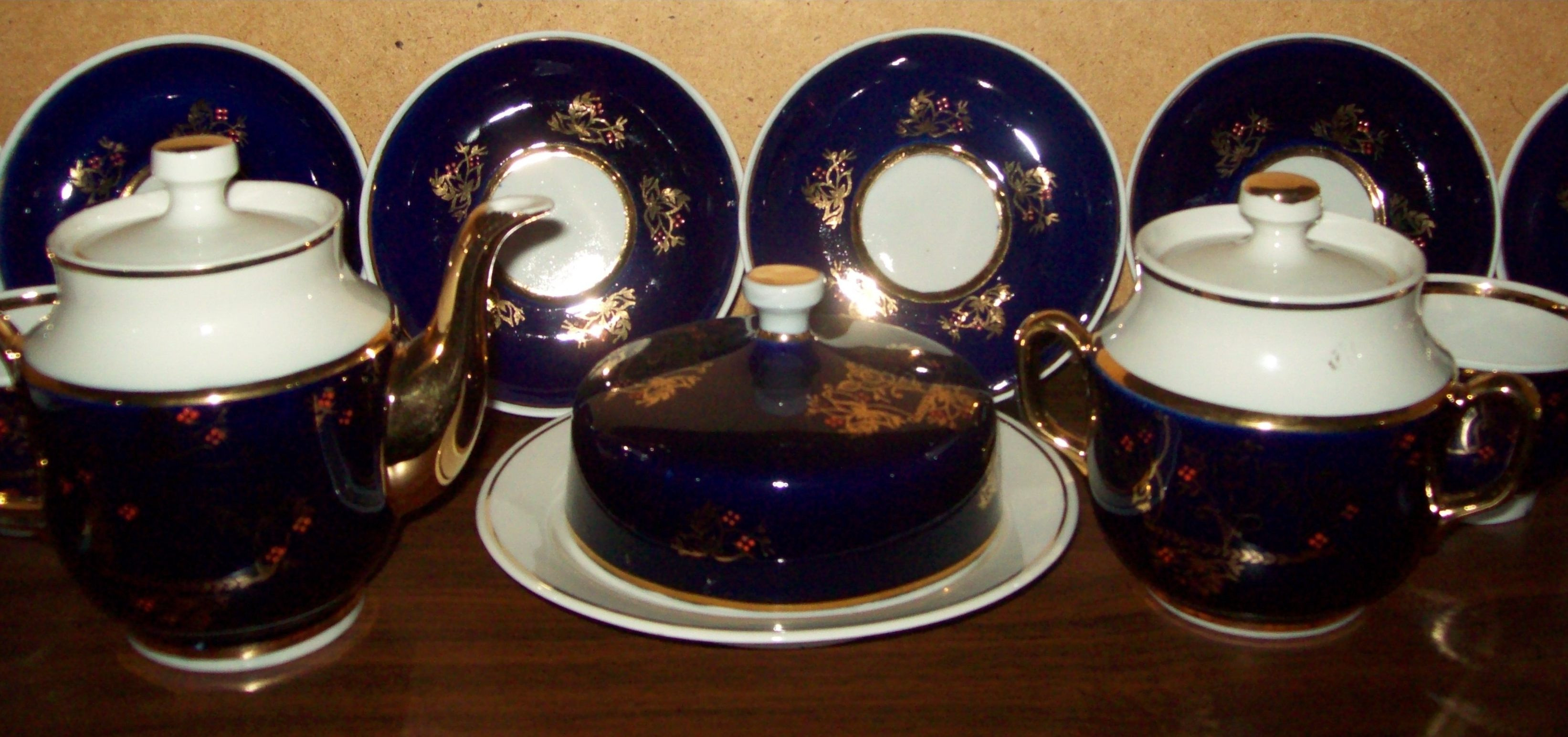 Фарфорный набор.